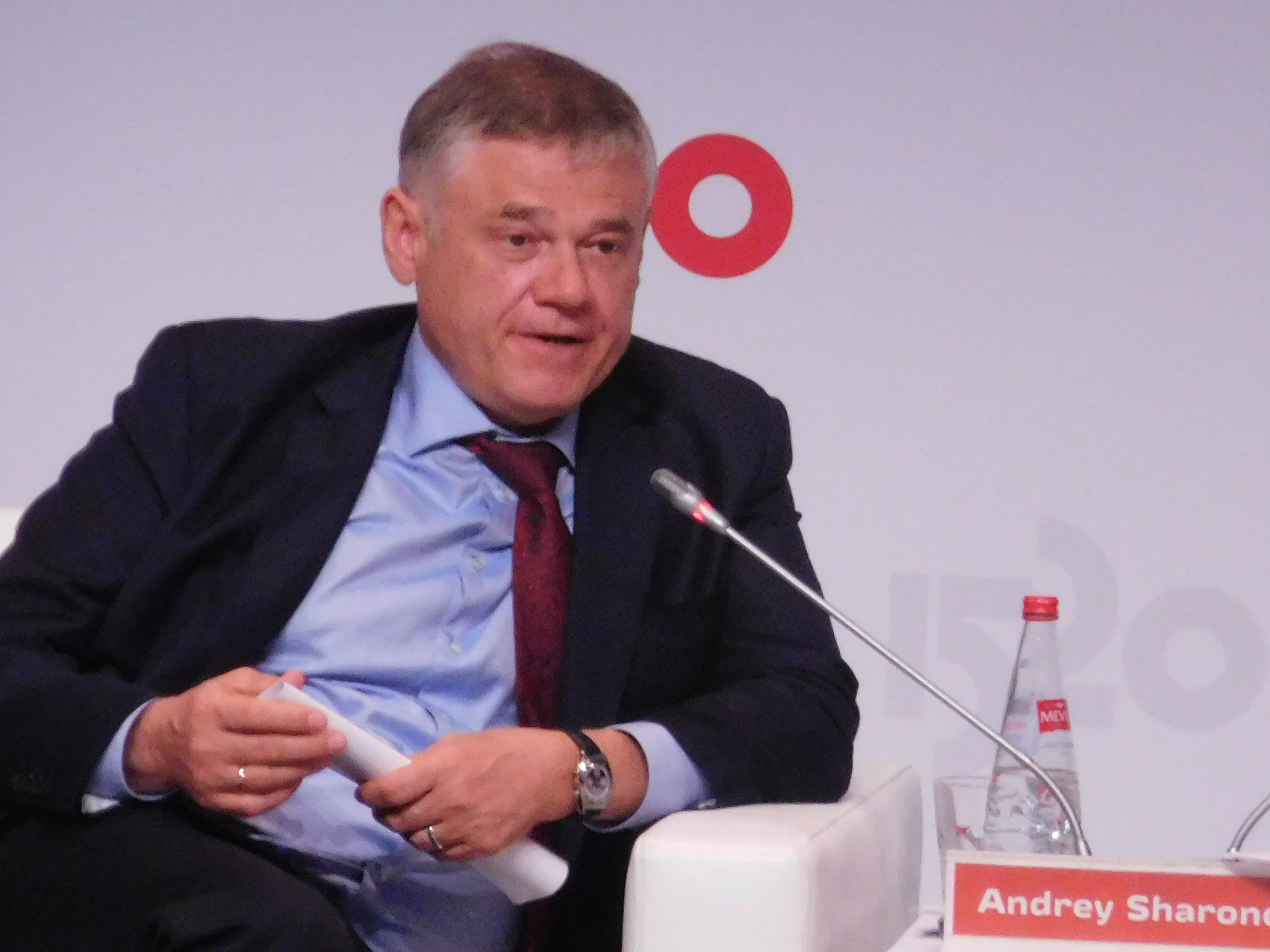 Глава Евраз pls Александр Абрамов на форуме в Сочи